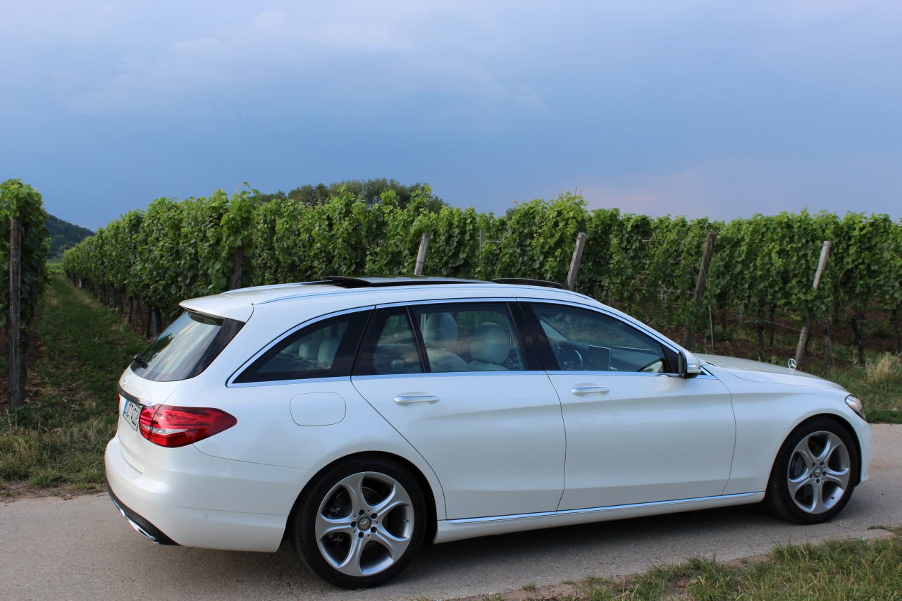 das neue T-Modell C-Klasse